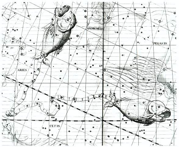 Pisces